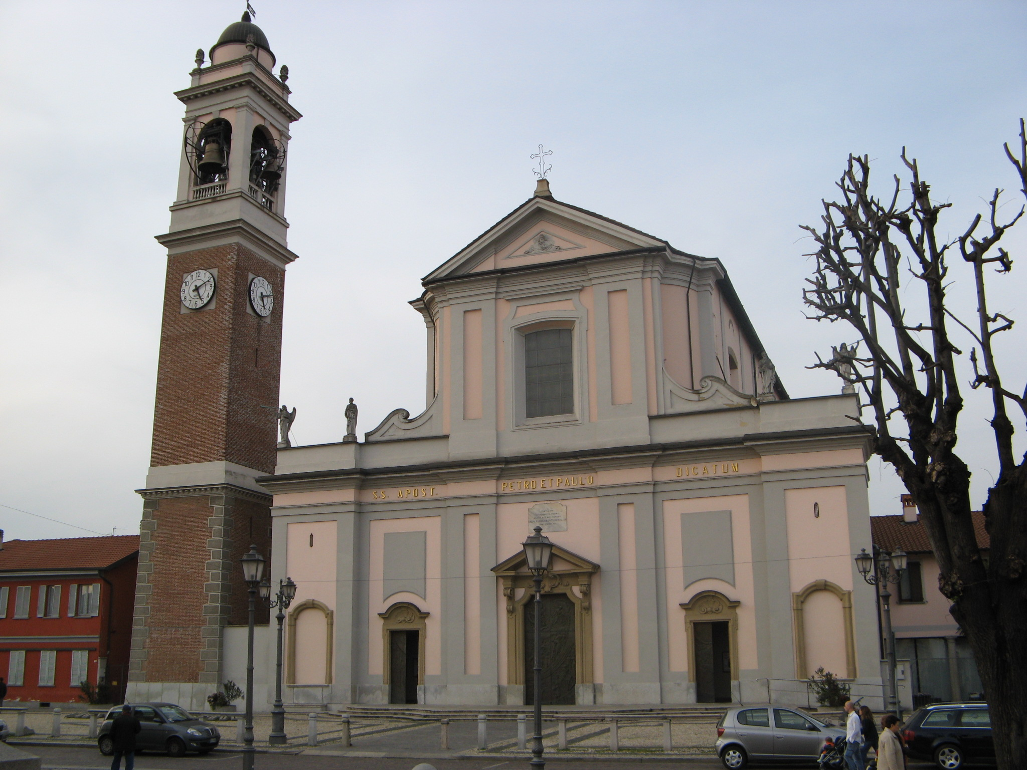 Arluno, Chiesa Parrocchiale dei SS. Apostoli Pietro e Paolo